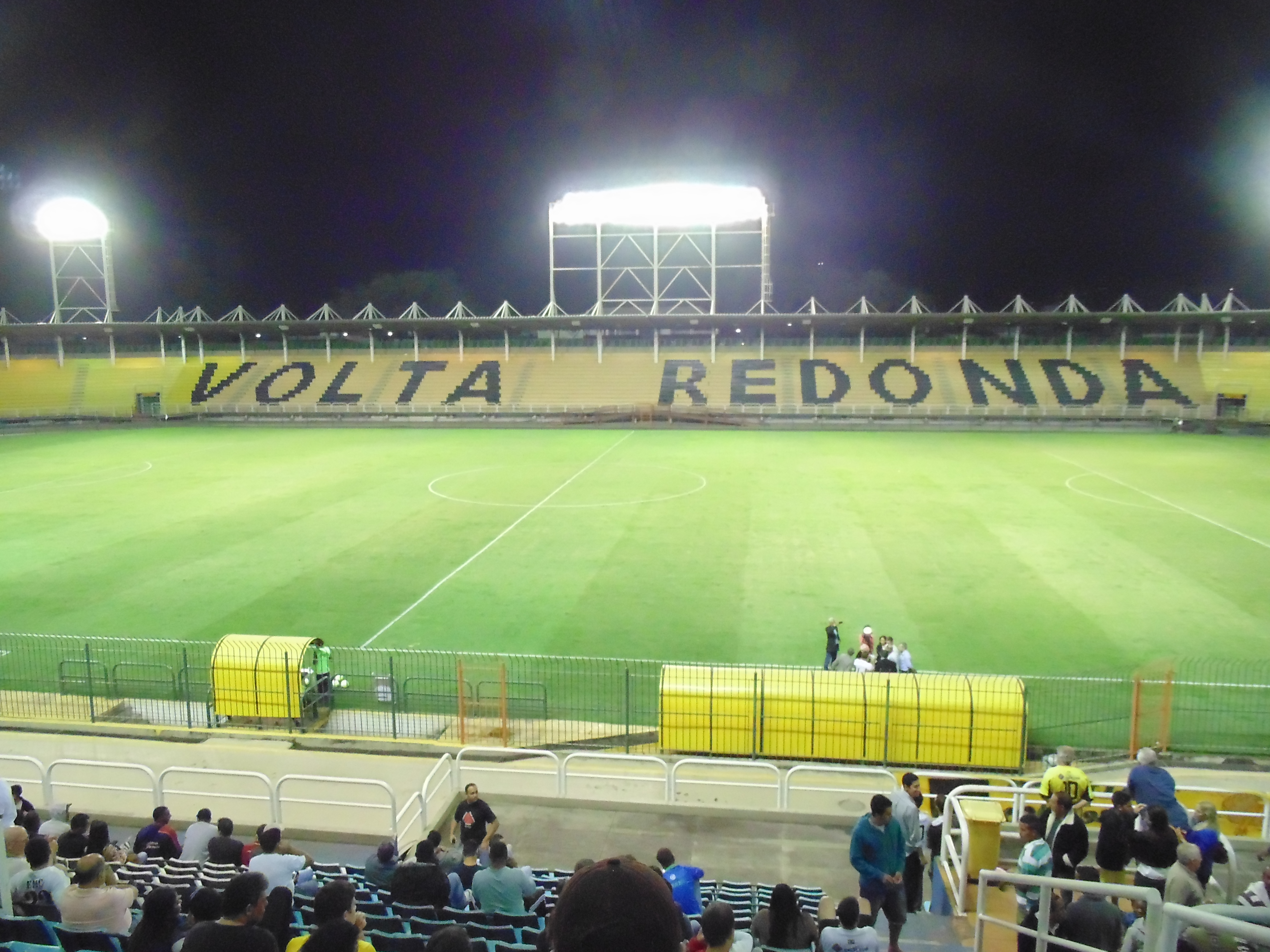 Foto do estádio General Sylvio Raulino de Oliveira, em Volta Redonda.